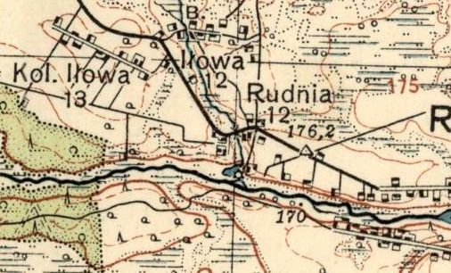 Fragment mapy Wojskowego Instytutu Geograficznego z 1933 przedstawiający Iłowę, Iłowę Kolonię i Rudnię